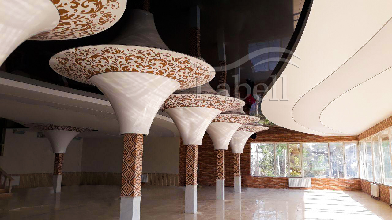 تالار پذیرایی با سقف و ستون کشسان